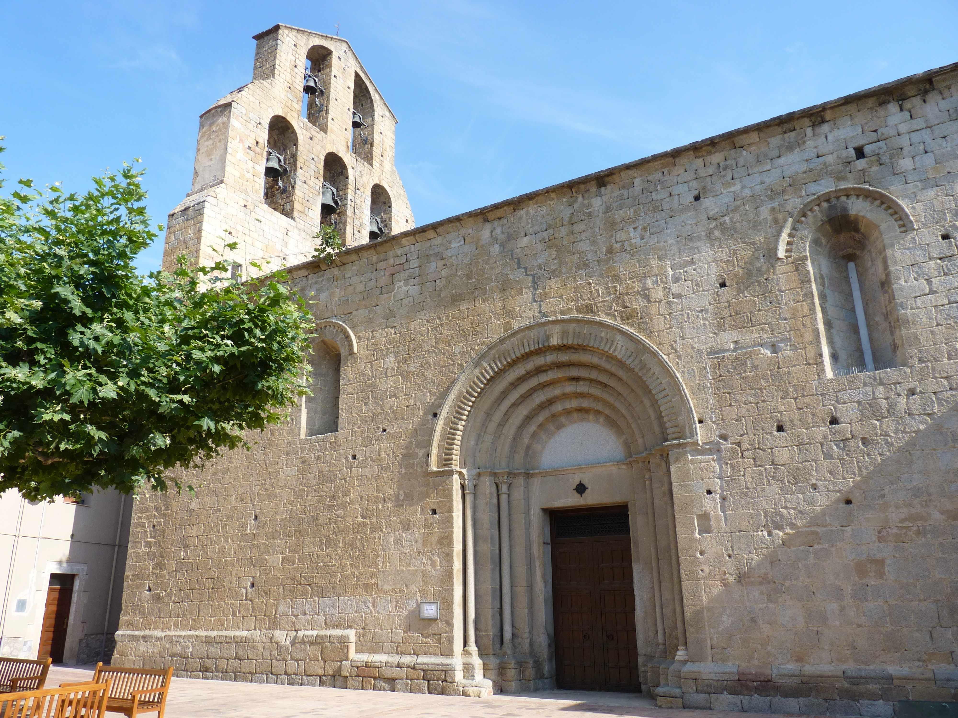 Église Sainte-Marie, Agullana (Haut-Ampurdan, Gérone, Catalogne, Espagne)